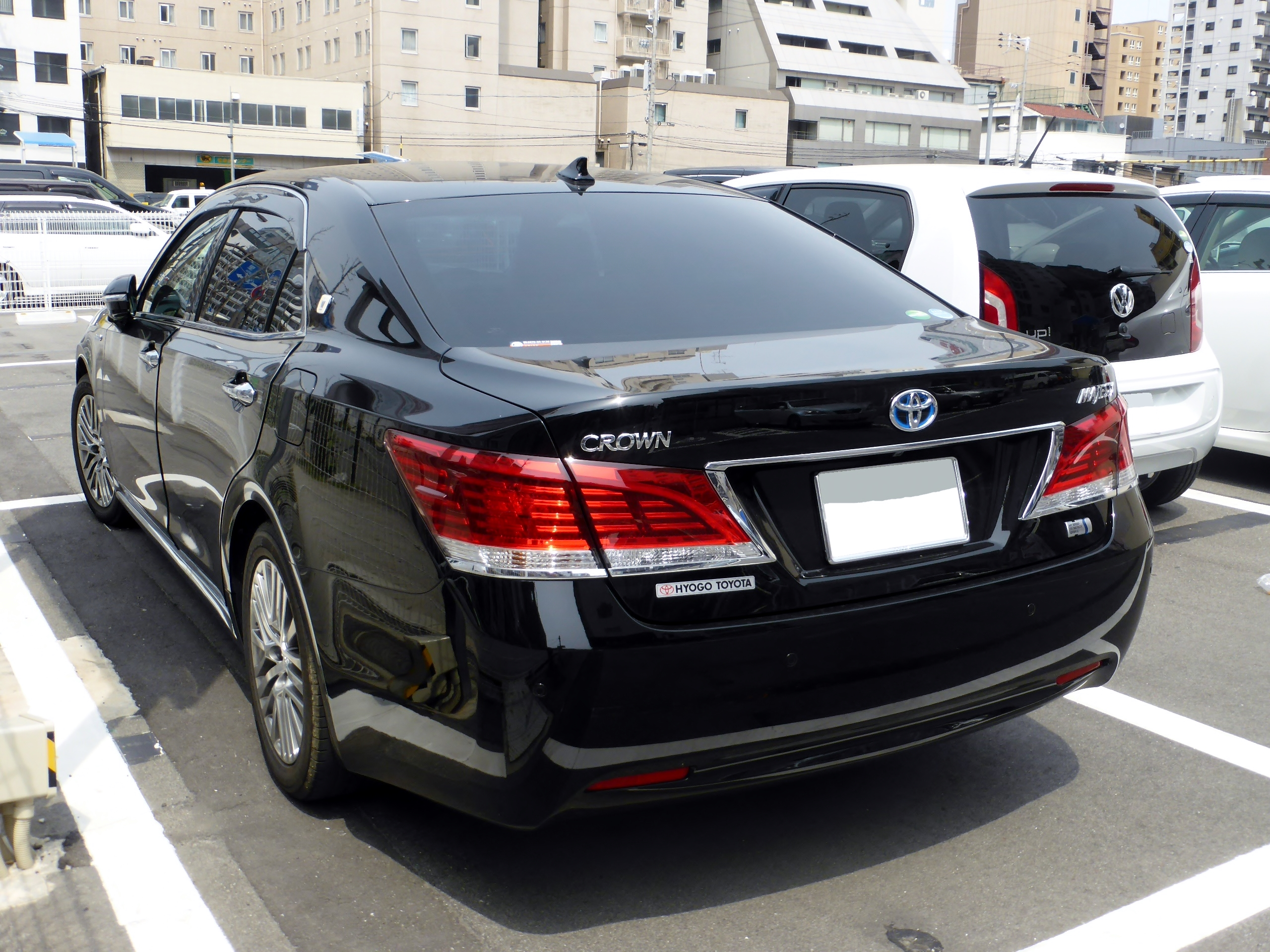 S214型トヨタ・クラウンマジェスタ"Fバージョン"をリアから撮影。